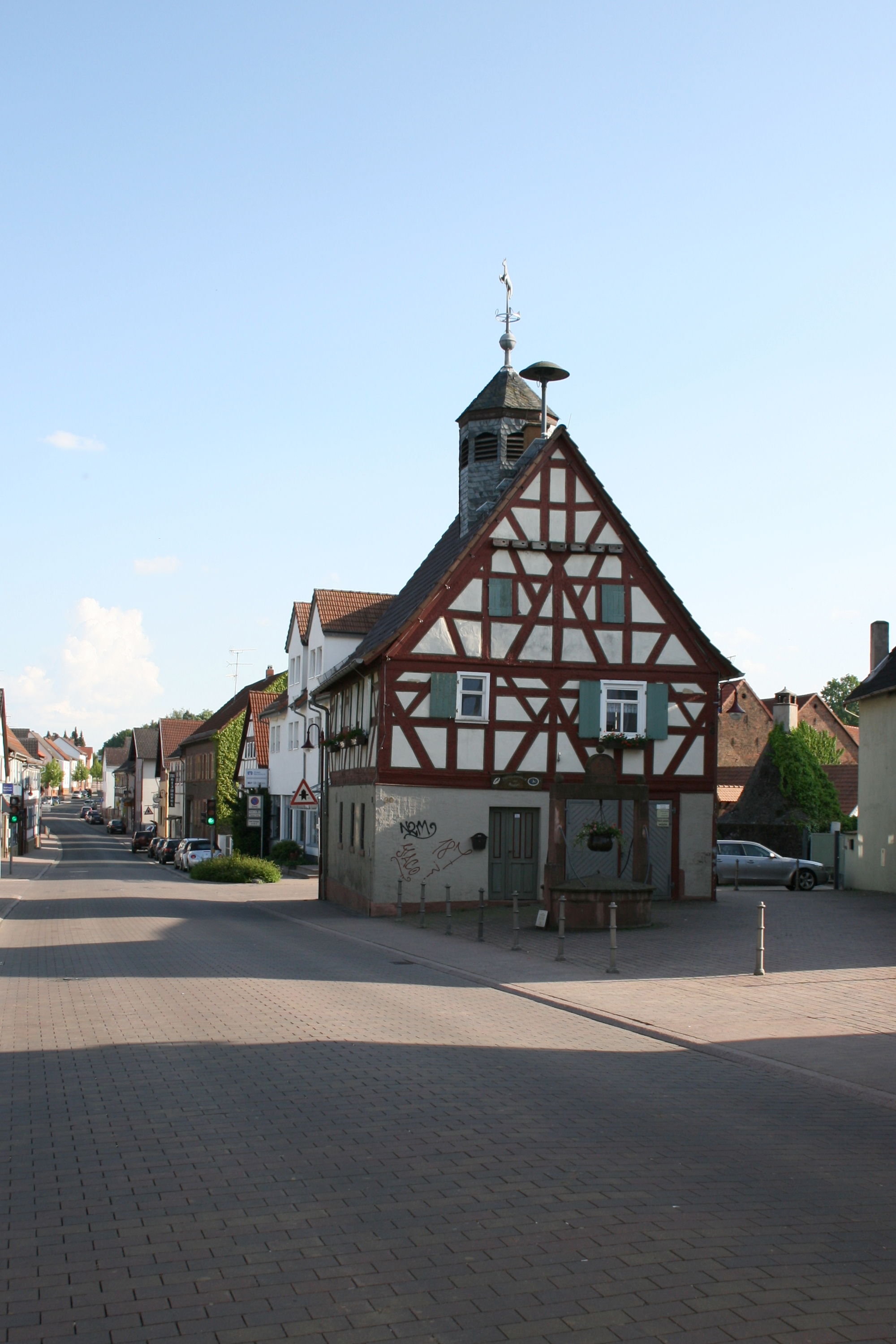 Hauptstraße (Hanauer Str.) mit Altem Rathaus (um 1700) in Bruchköbel-Roßdorf, davor der Rathausbrunnen (um 1713), rechts dahinter Backhaus (um 1773).